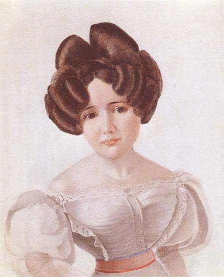 Княжна Марфа Михайловна Шаховская (1799-1886), дочь Михаила Александровича Шаховского (1758-1817) и Елизаветы Сергеевны Головиной (1767-1831); с 1841 года вторая жена декабриста А.Н.Муравьева (1792-1863).